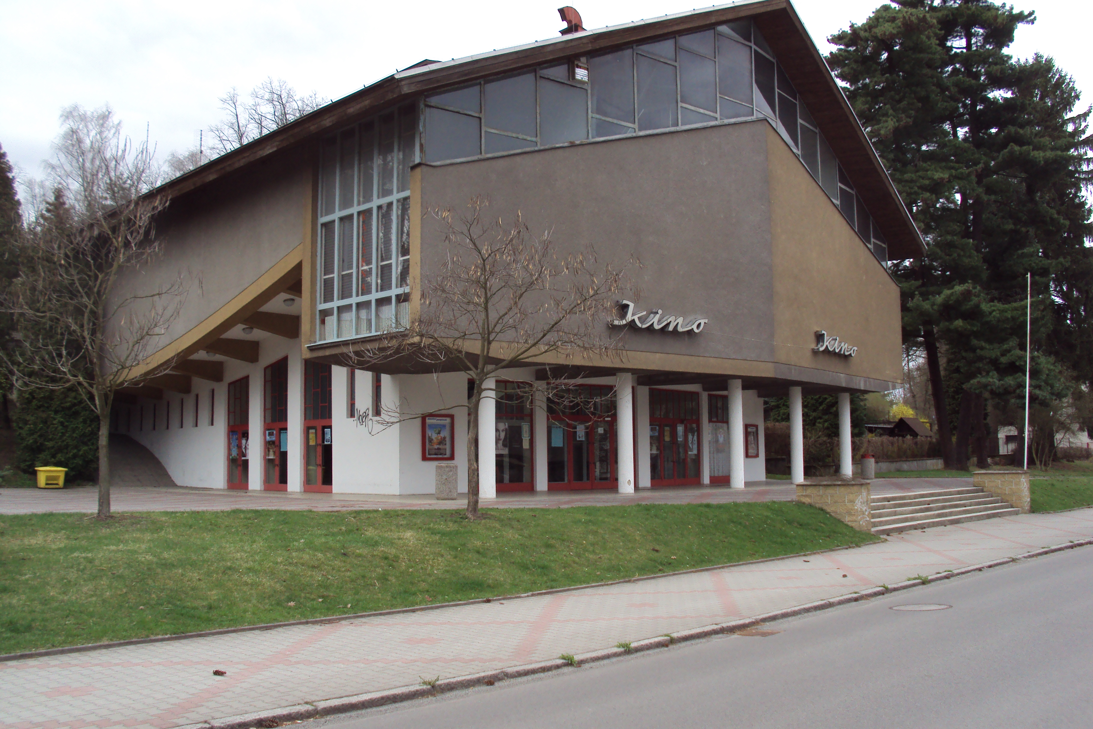 Kino "Máj" v Doksech. Nachází se u silnice mezi nádražím a hlavním náměstím